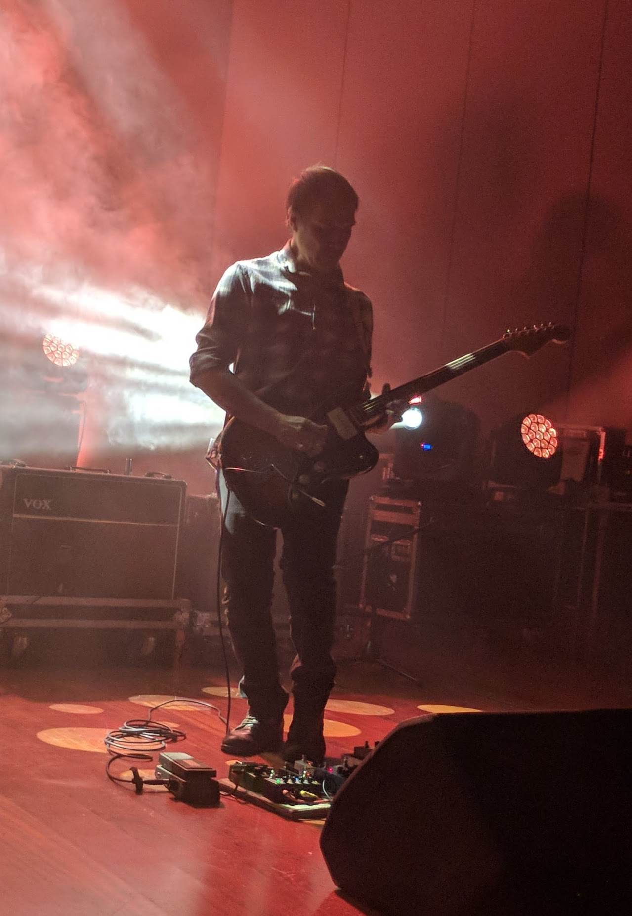 Florent Muñoz (Los Planetas) tocando en A Coruña (22/12/1970)